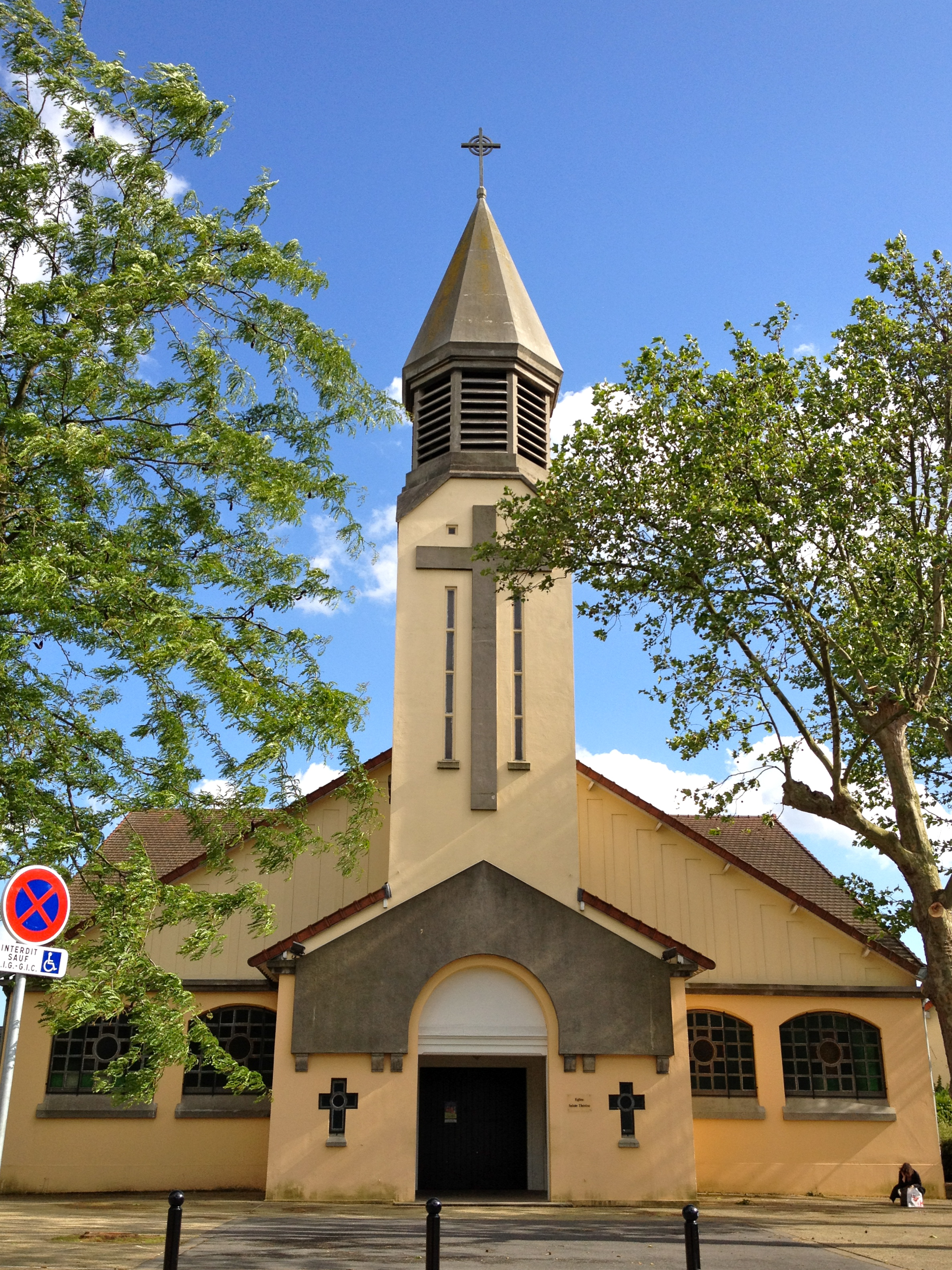 L'église Sainte-Thérèse de Savigny-sur-Orge (91)